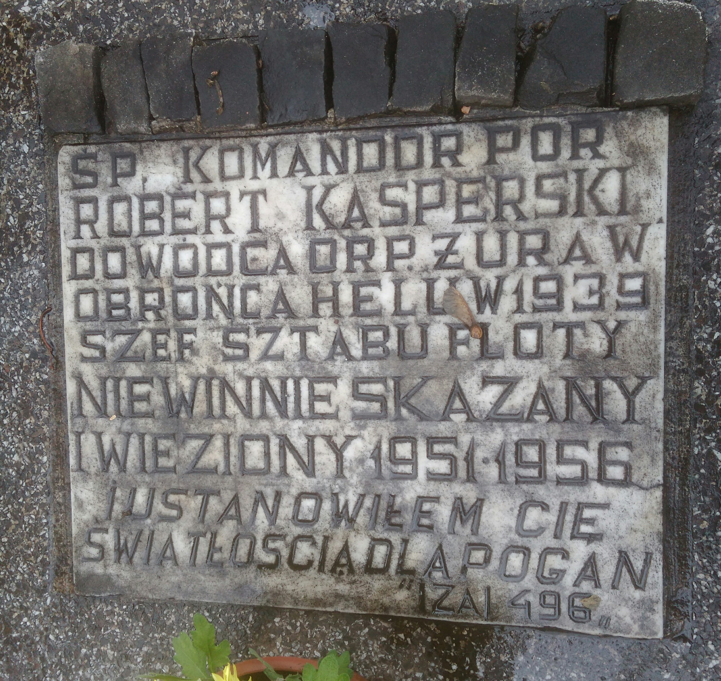 Robert Kasperski. Grób znajduje się na cmentarzu w Gdańsku Nowym Porcie.